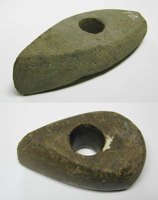 Två olika exemplar av enkel skafthålsyxa från senneolitikum, södra Sverige. Den övre skafthålsyxan kommer från Prästgården i Friggeråkers socken, Gudhems härad, Falköpings kommun, f.d. Skaraborgs län, Västergötland, Västra Götalands län, Sverige. Yxan skänktes år 1926 till Falbygdens museum i Falköping och har där inventarienummer 90 (2M16-F0090). Den undre skafthålsyxan saknar känd fyndort och köptes in till Falbygdens museum år 1946 och har där inventarienummer 1840:3 (2M16-F1840-03).